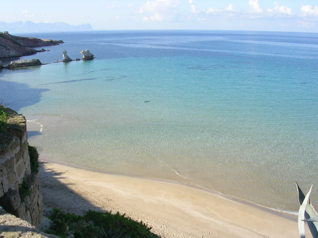 palermo_terrasini_1